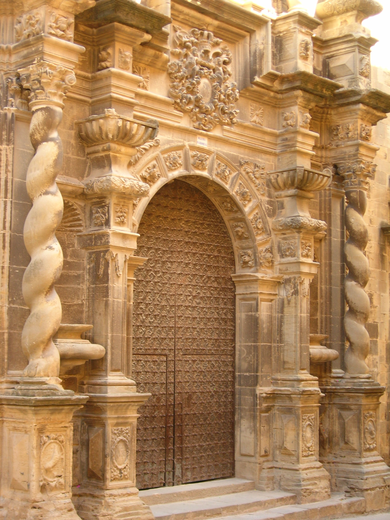 Església de l'Assumpció (Calaceit)